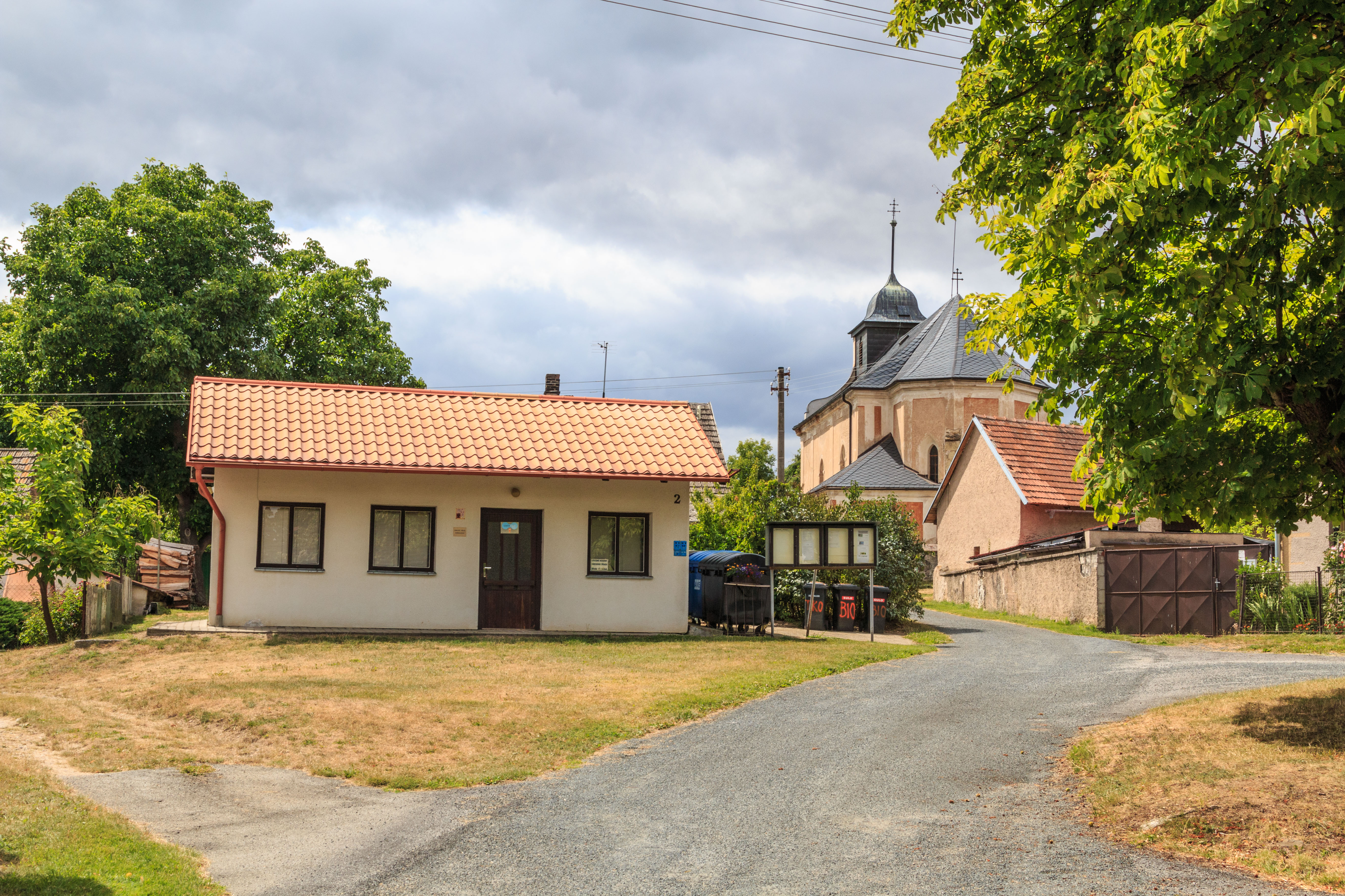 Heřmanice - obecní úřad